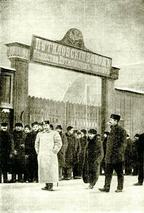 У ворот Путиловского завода. Январь 1905 года. Фотография.